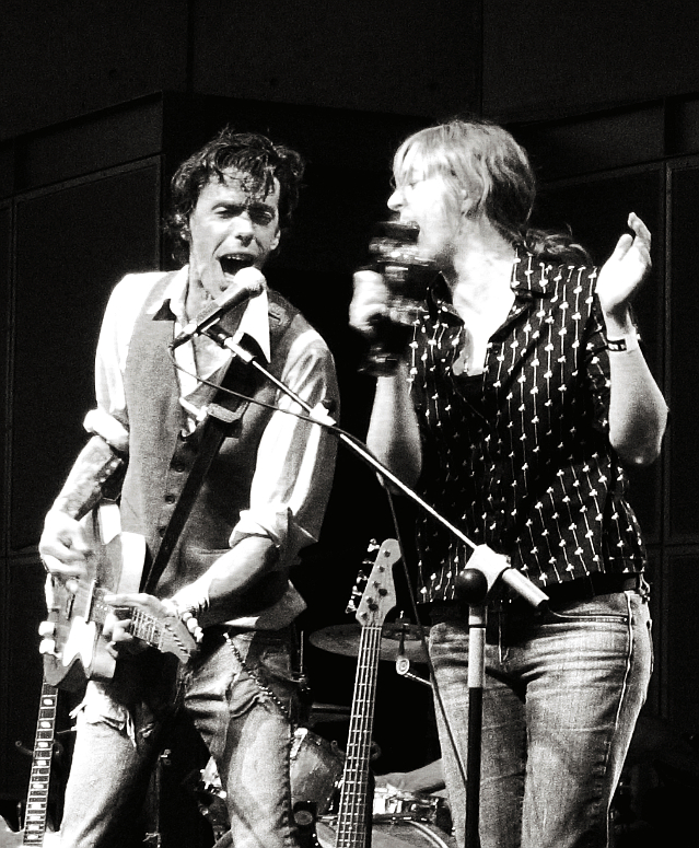 Do Make Say Think Final Fantasy free Canada day show '07.j&j